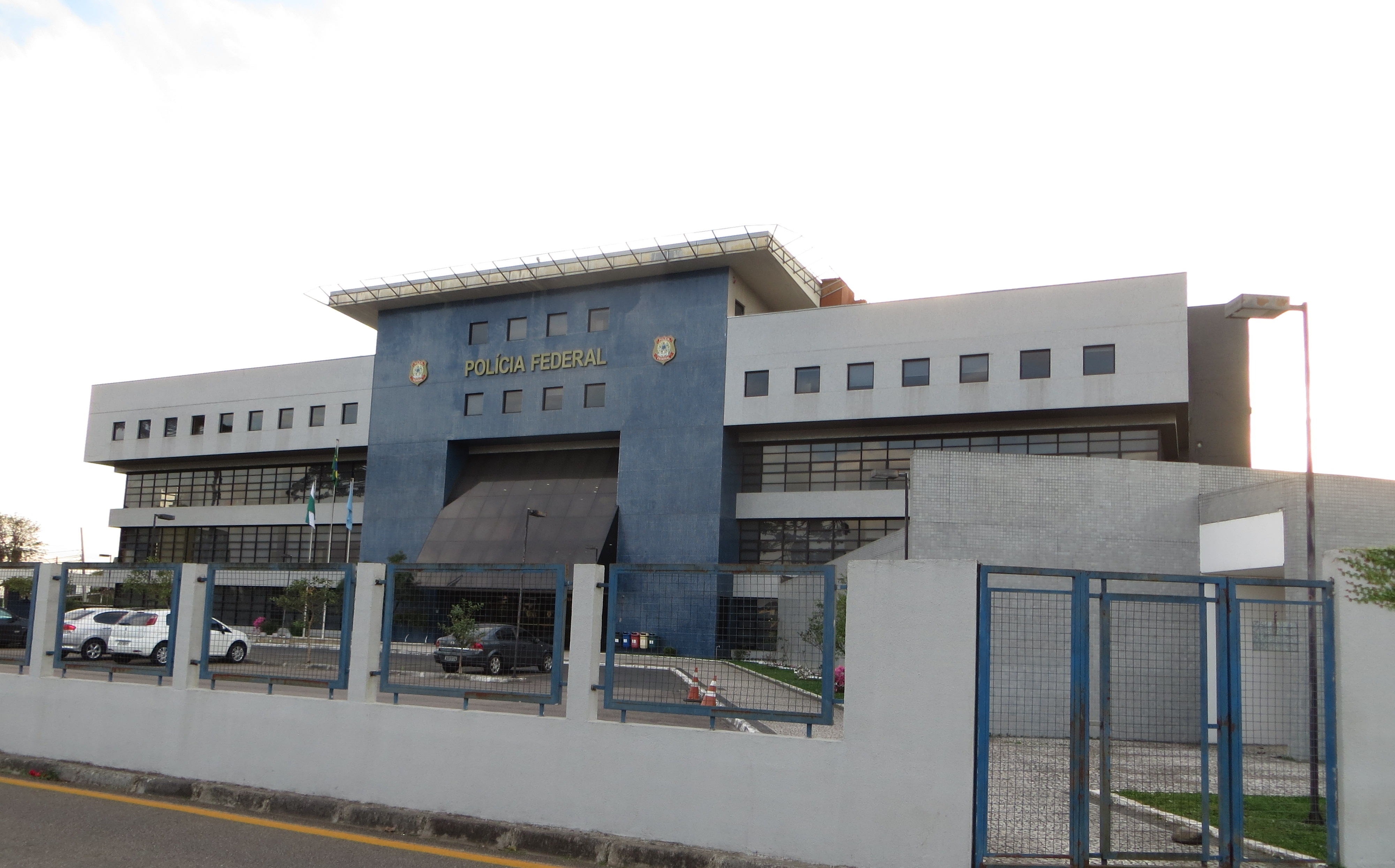 Superintendência do Departamento de Polícia Federal, no bairro do Santa Cândida, na Administração Regional do Boa Vista, em Curitiba, capital do estado brasileiro do Paraná.